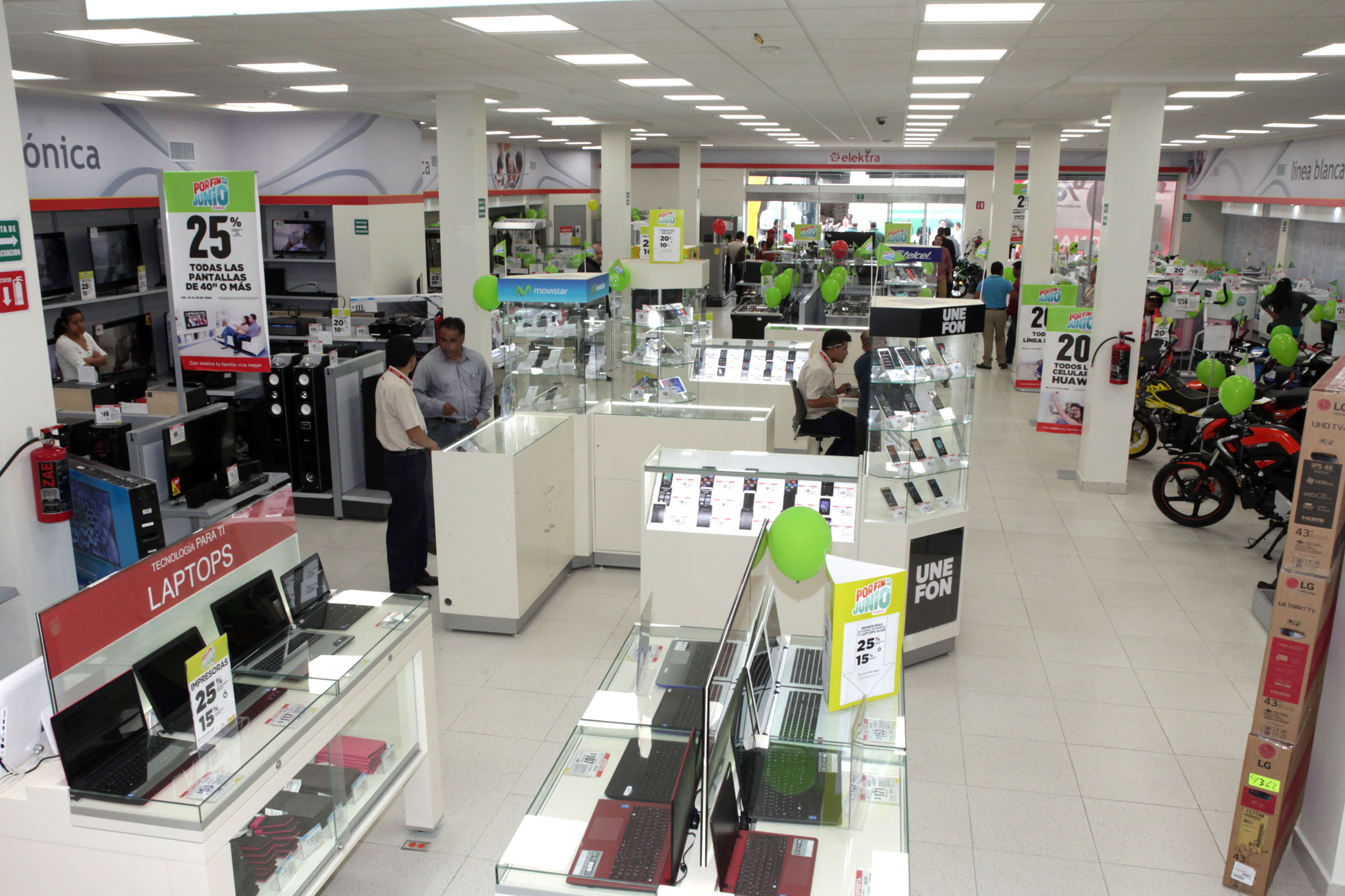 Inauguración de tienda Elektra en Villa Víctora, Edo Méx.